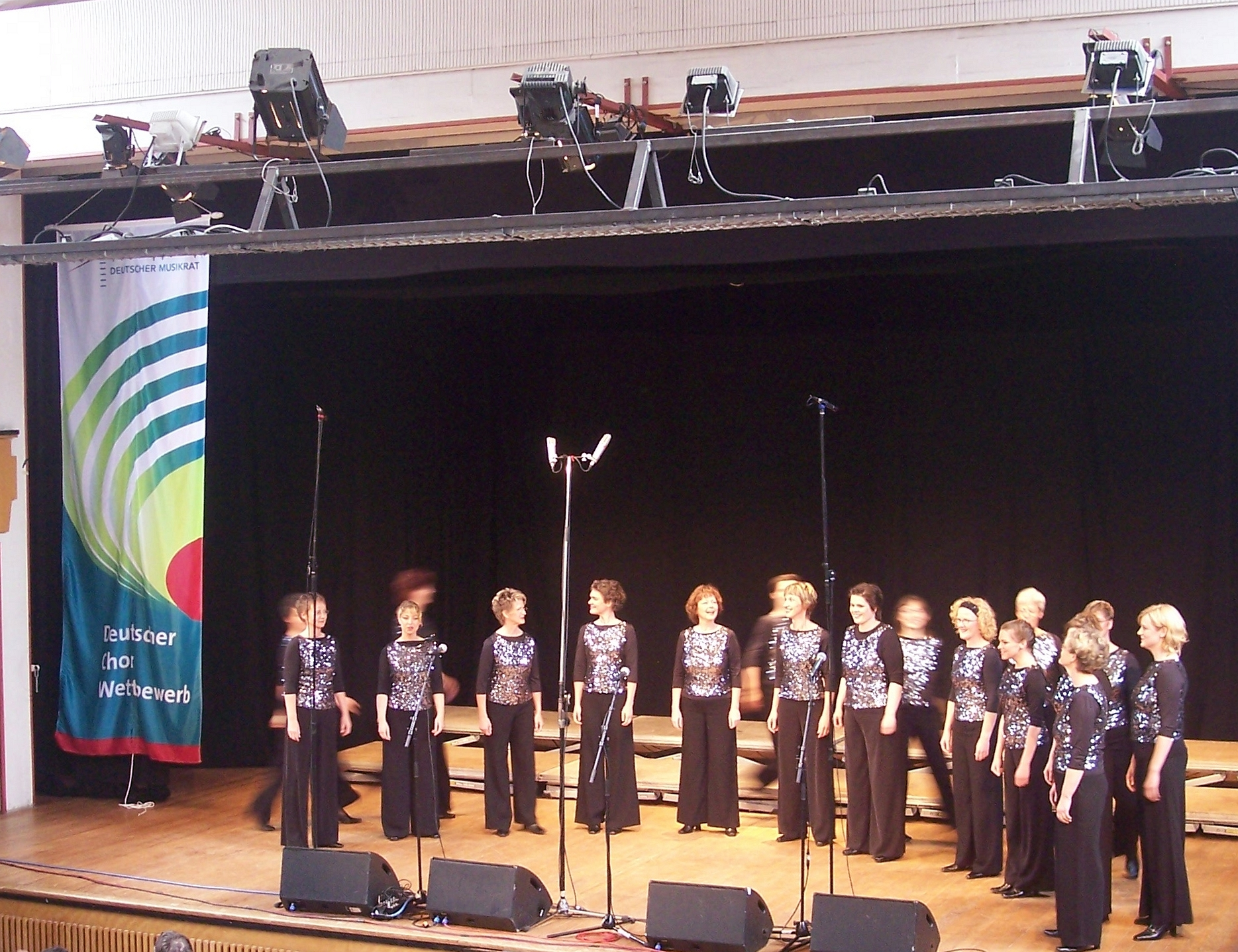 Ladies First beim Wertungssingen des Deutschen Chorwettbewerbs 2006 in Kiel (noch beim Aufstellung nehmen)